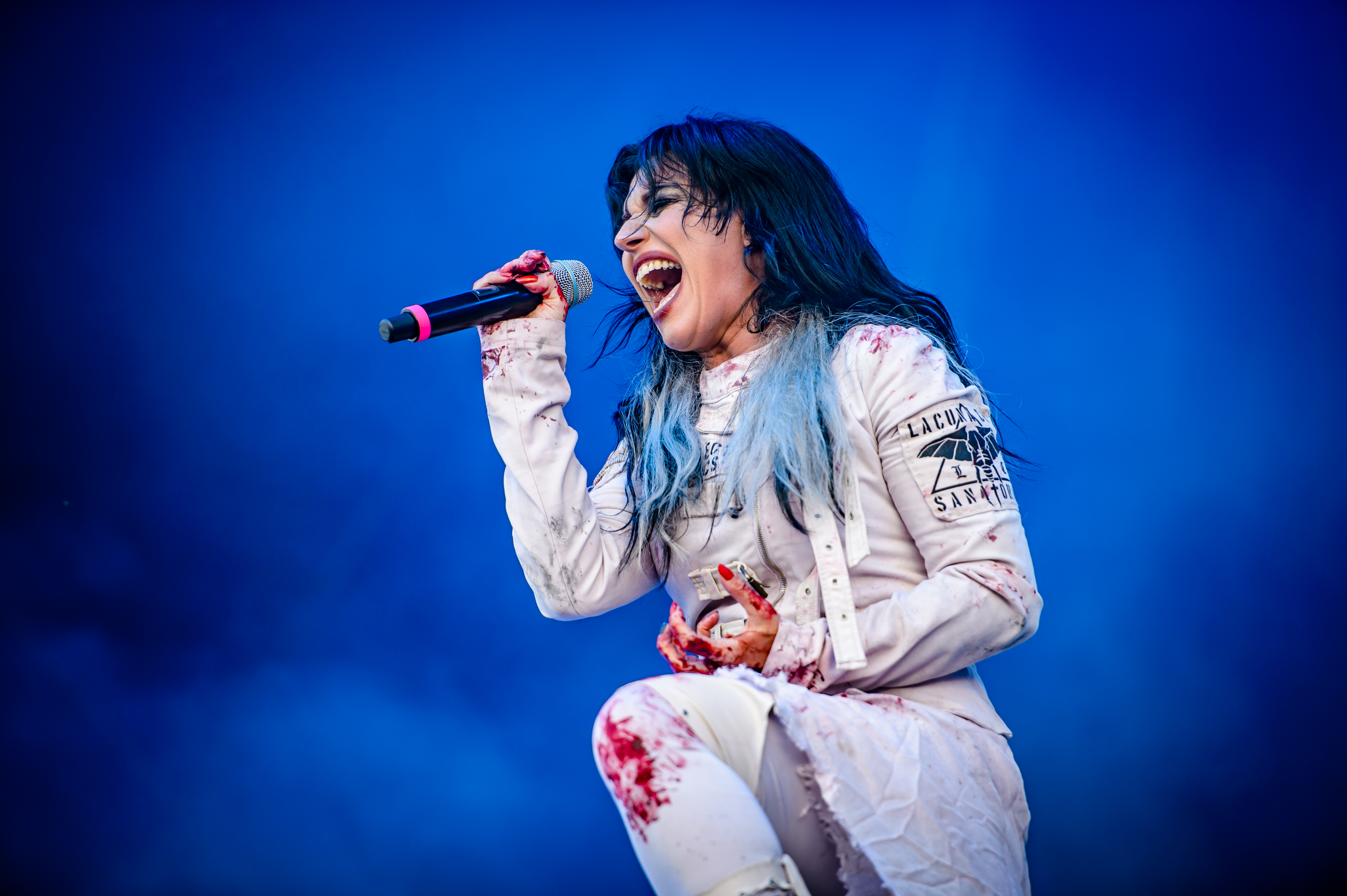 'RockHarz Open Air 2017; Ballenstedt': 'Lacuna Coil'